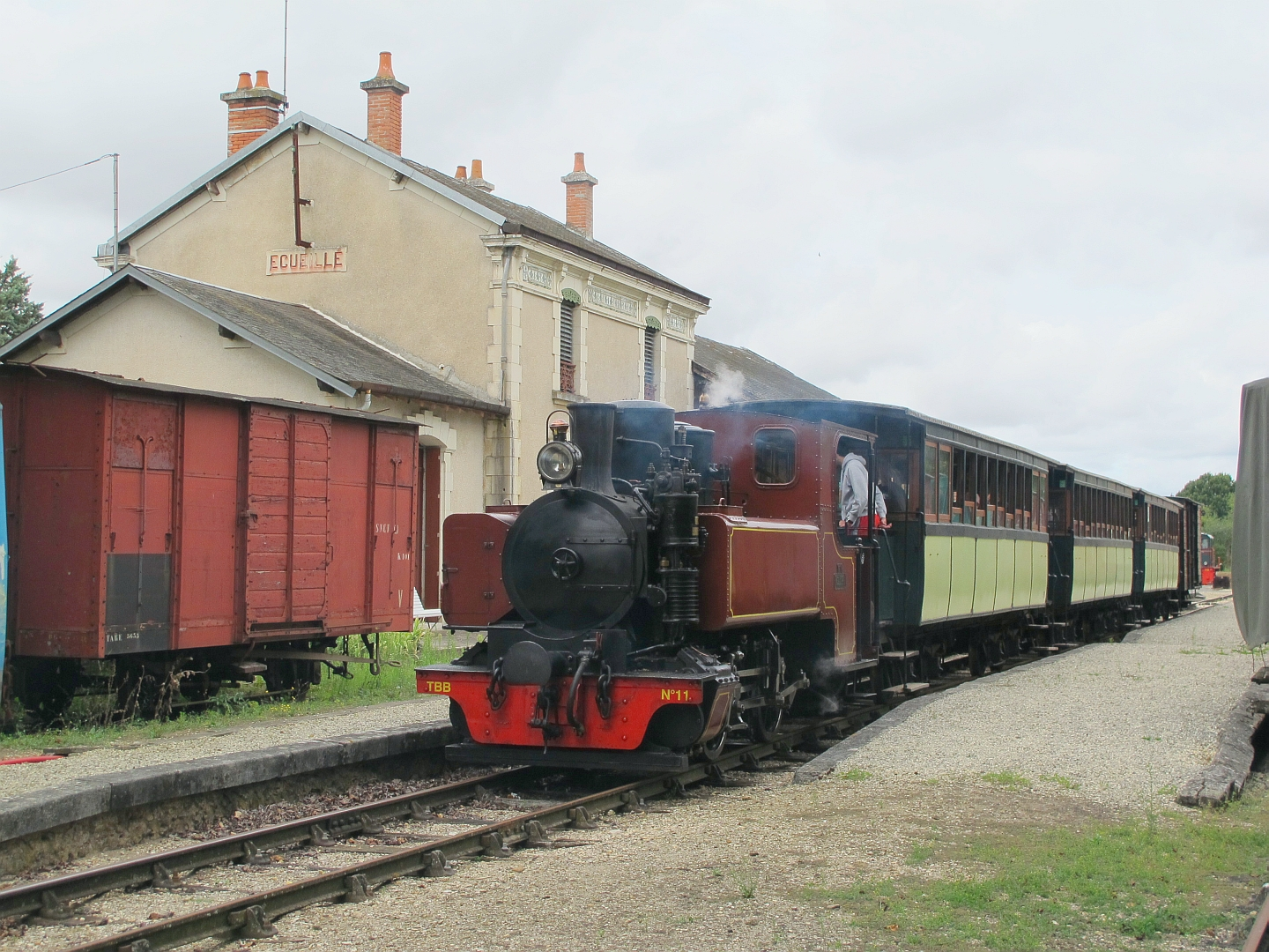 Un train du TBB en gare d'Écueillé (Indre) le 23 août 2015.